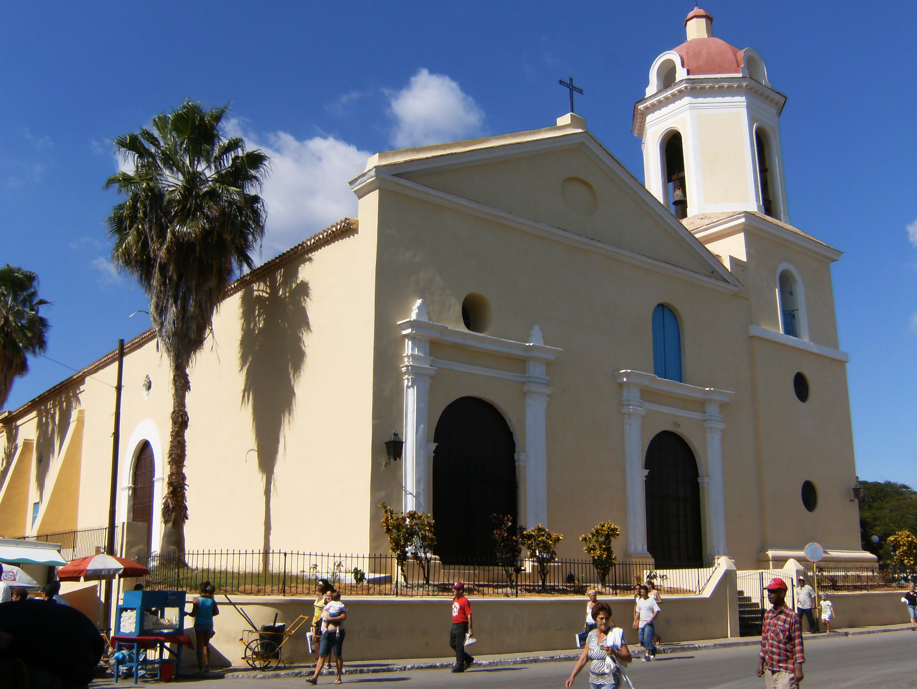 Iglesia de la Asuncion, ubicada en el centro de Guanabacoa, totalmente reparada a finales del año 2010